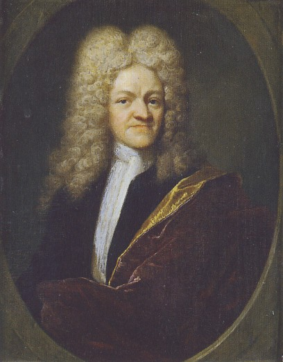 Philologe und Biograf Johann Albert Fabricius